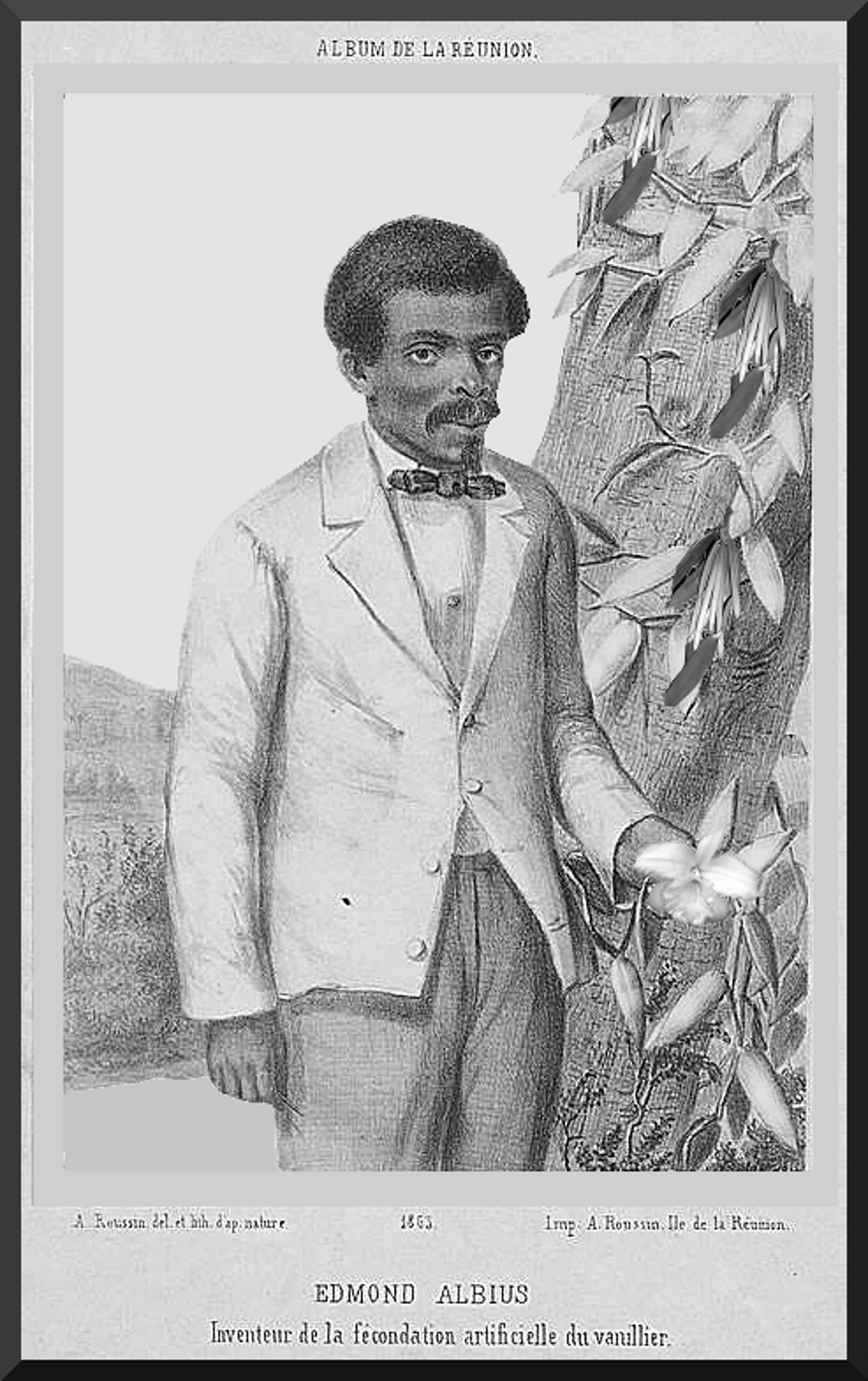 Edmond Albius inventeur de la fécondation artificielle du vanillier. Image composée d'après Antoine Louis Roussin et d'une fleur de vanille.